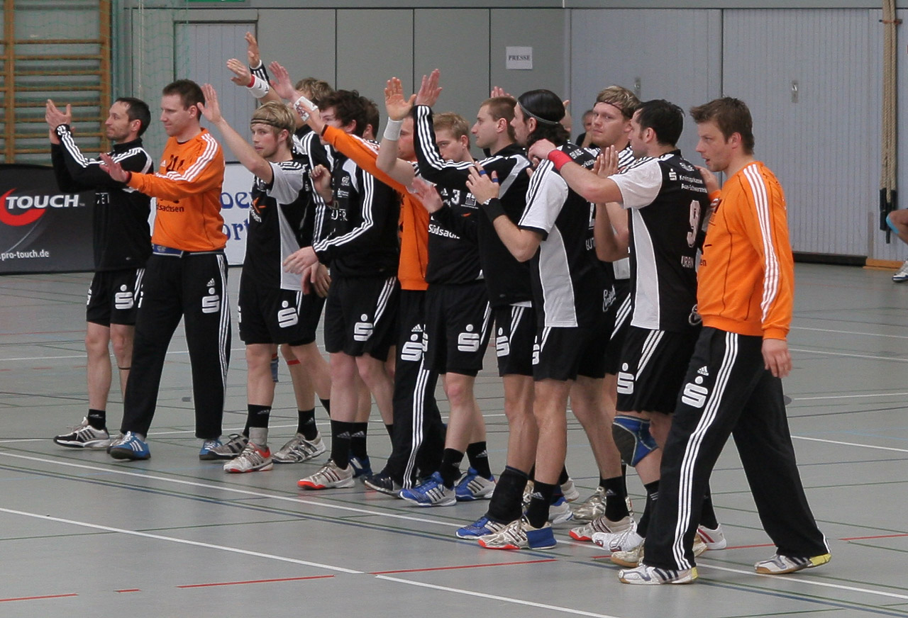 Die Mannschaft des Handball-Zweitligisten EHV Aue. Am 19. April 2009 in Groß-Bieberau beim Spiel gegen die TSG Groß-Bieberau in der Großsporthalle Groß-Bieberau.